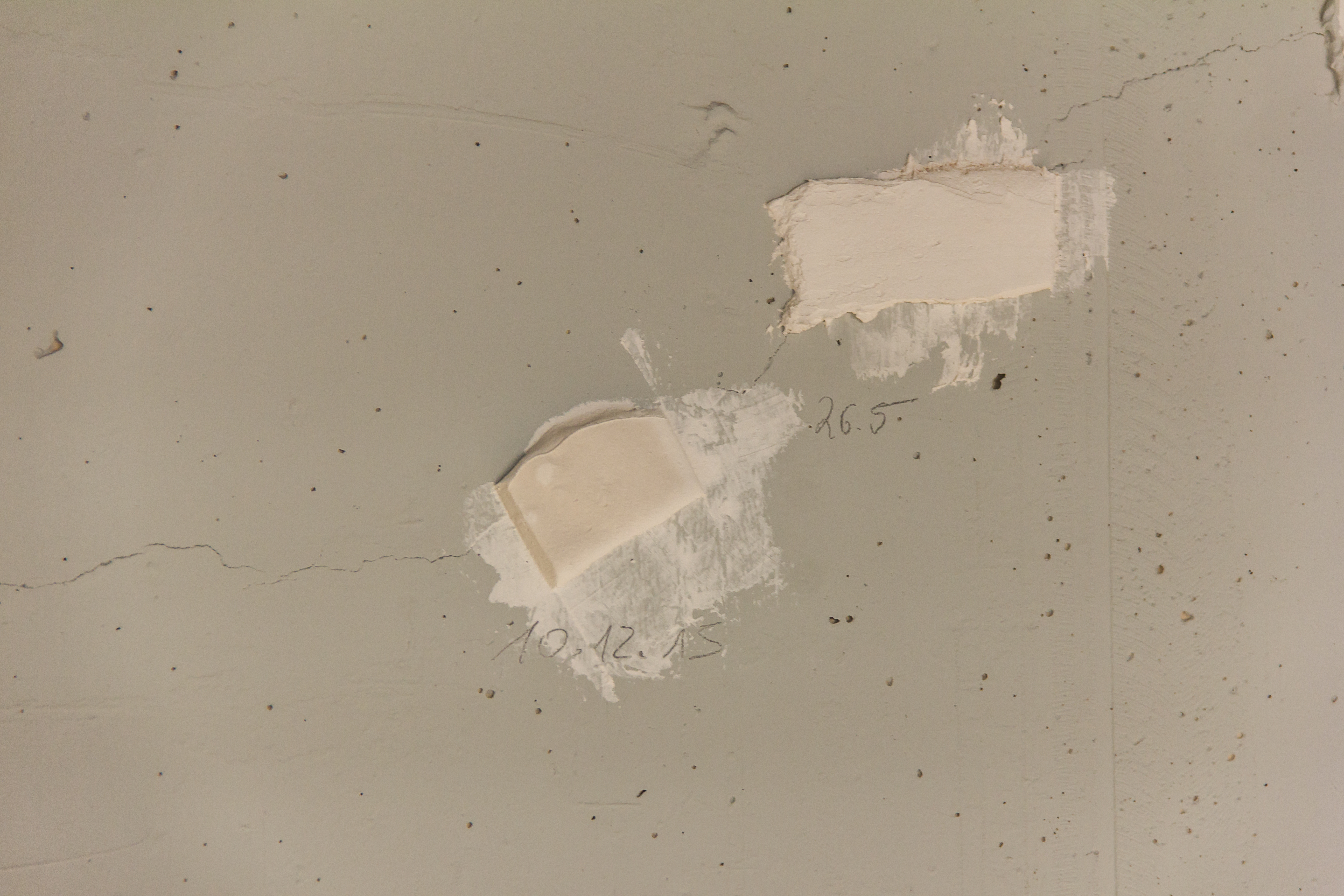 Rettungshubschrauberstation Köln-Kalkberg im Bau. Der hinter der Station errichtete Hügel muss wieder abgetragen werden, da die Last auf den Berg zu hoch ist und es bereits zu Rissen in Bodenplatte und Wände gibt. Foto: Gipsmarken markieren die Risse an der Rückwand des Hangars. Dahinter befindet sich der Hügel, der nun abgetragen werden muss.